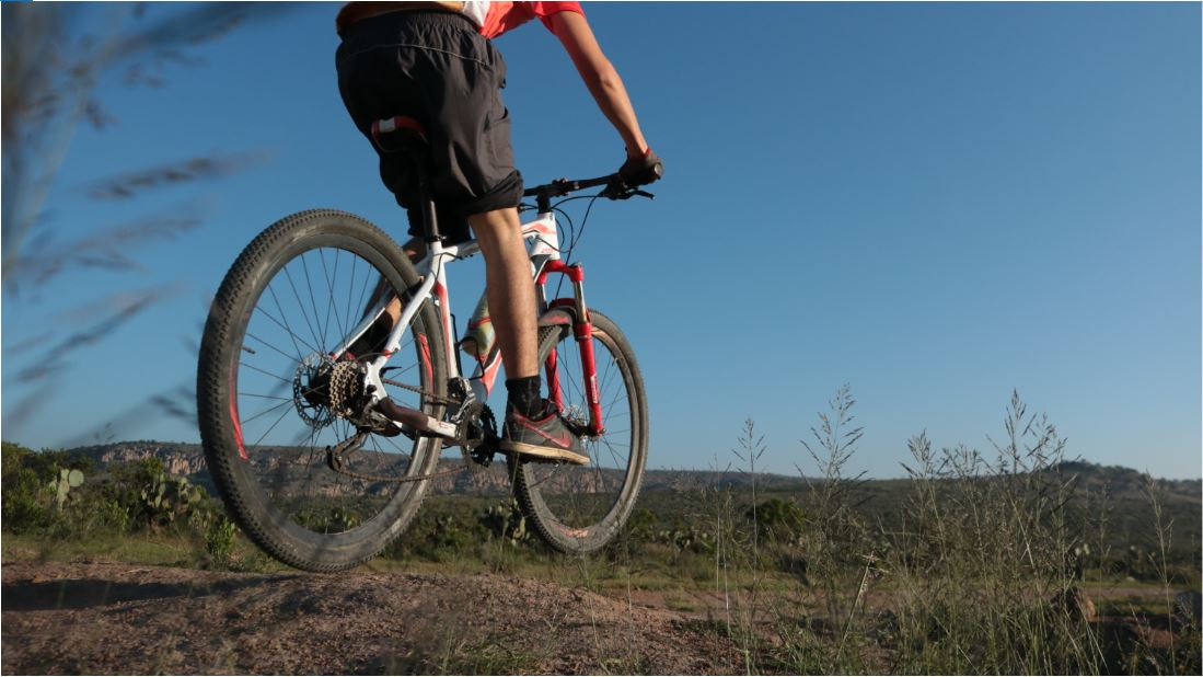 Ciclismo de montaña en La Posta, Jesús María, La Posta es uno de los lugares recurrentes para los amantes del ciclismo de montaña dentro del estado de Aguascalientes, México